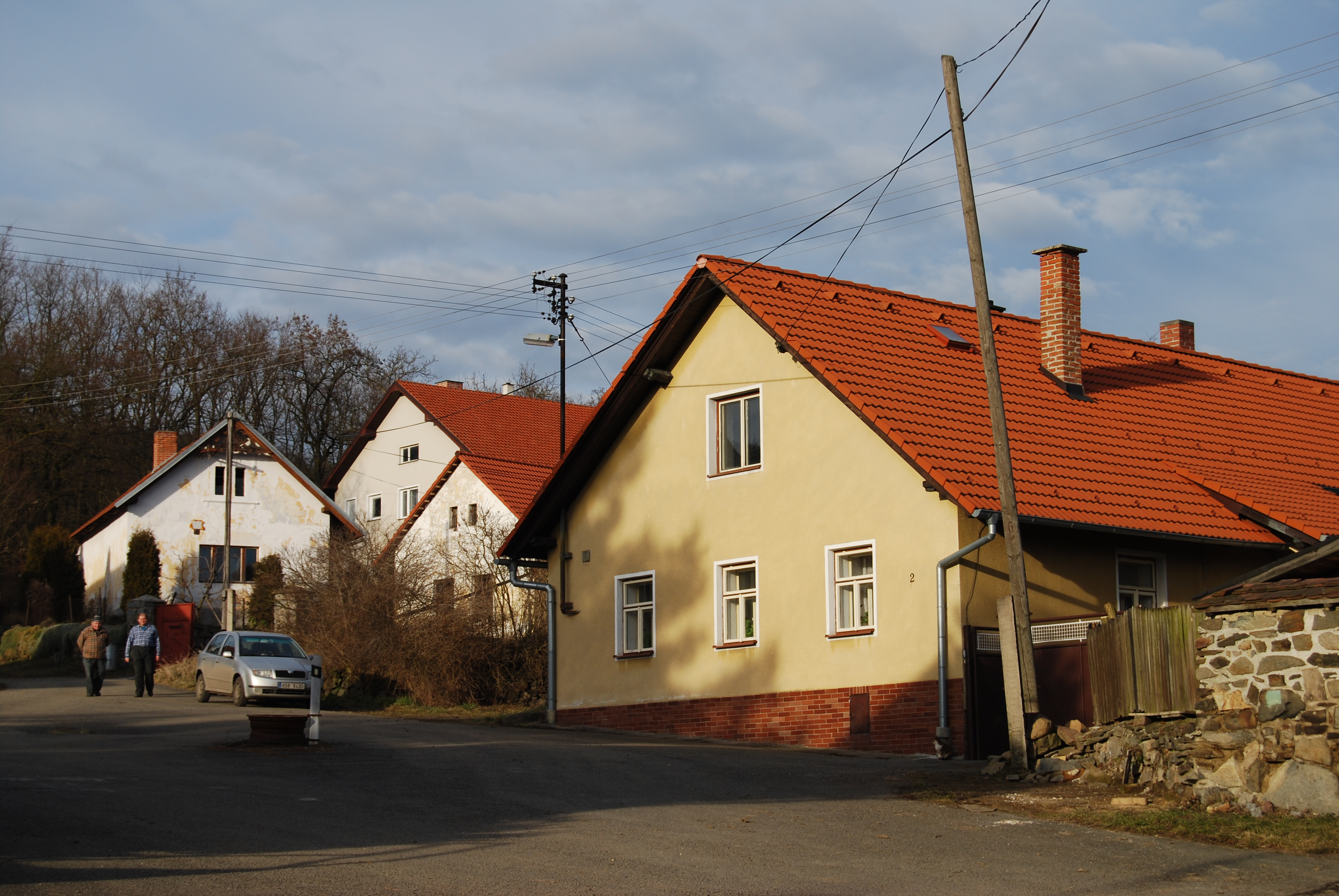 Pohled na část vesnice. Pořešice je část obce Vysoký Chlumec v okrese Příbram. Česká republika.